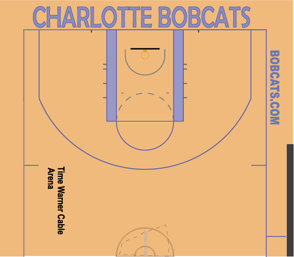 ボブキャッツホームコート配色